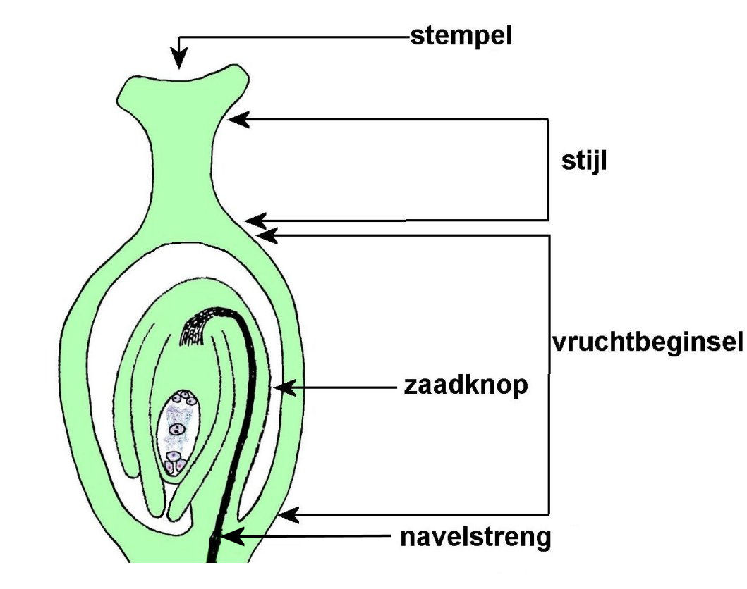 zelfgemaakte tekening van vruchtbeginsel